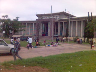 Rectorat_Unikin.jpg, le jour de la collation des grades académiques